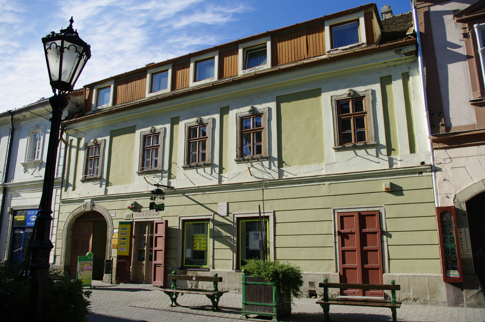 Kilián-ház (Eger, Széchenyi István u. 7.)